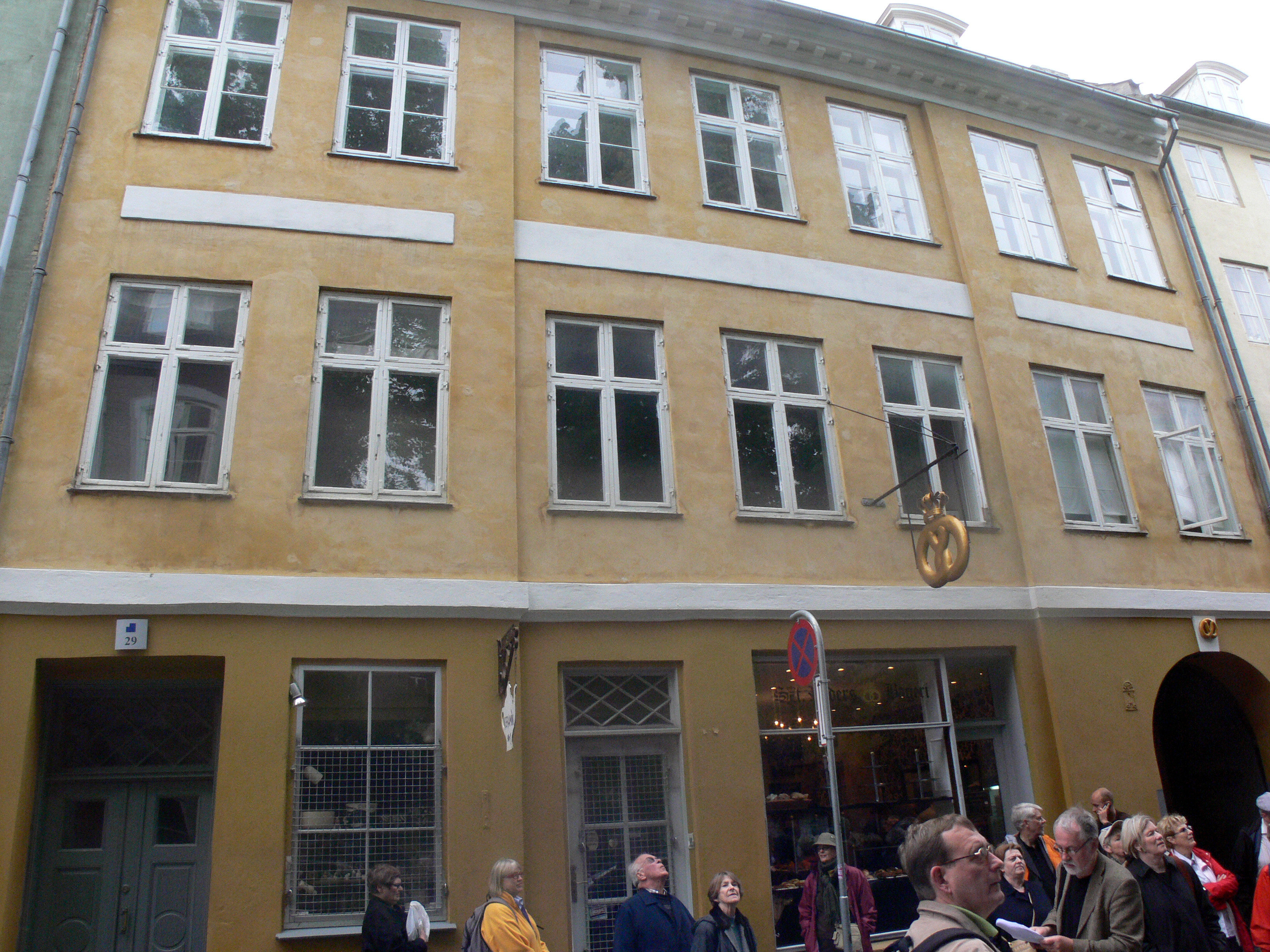 St. Pedersgade 29 in Kopenhagen. Älteste Bäckerei der Stadt aus dem 17. Jh. Hier wohnte die Frau des Amtmaður Grímur Jónsson.